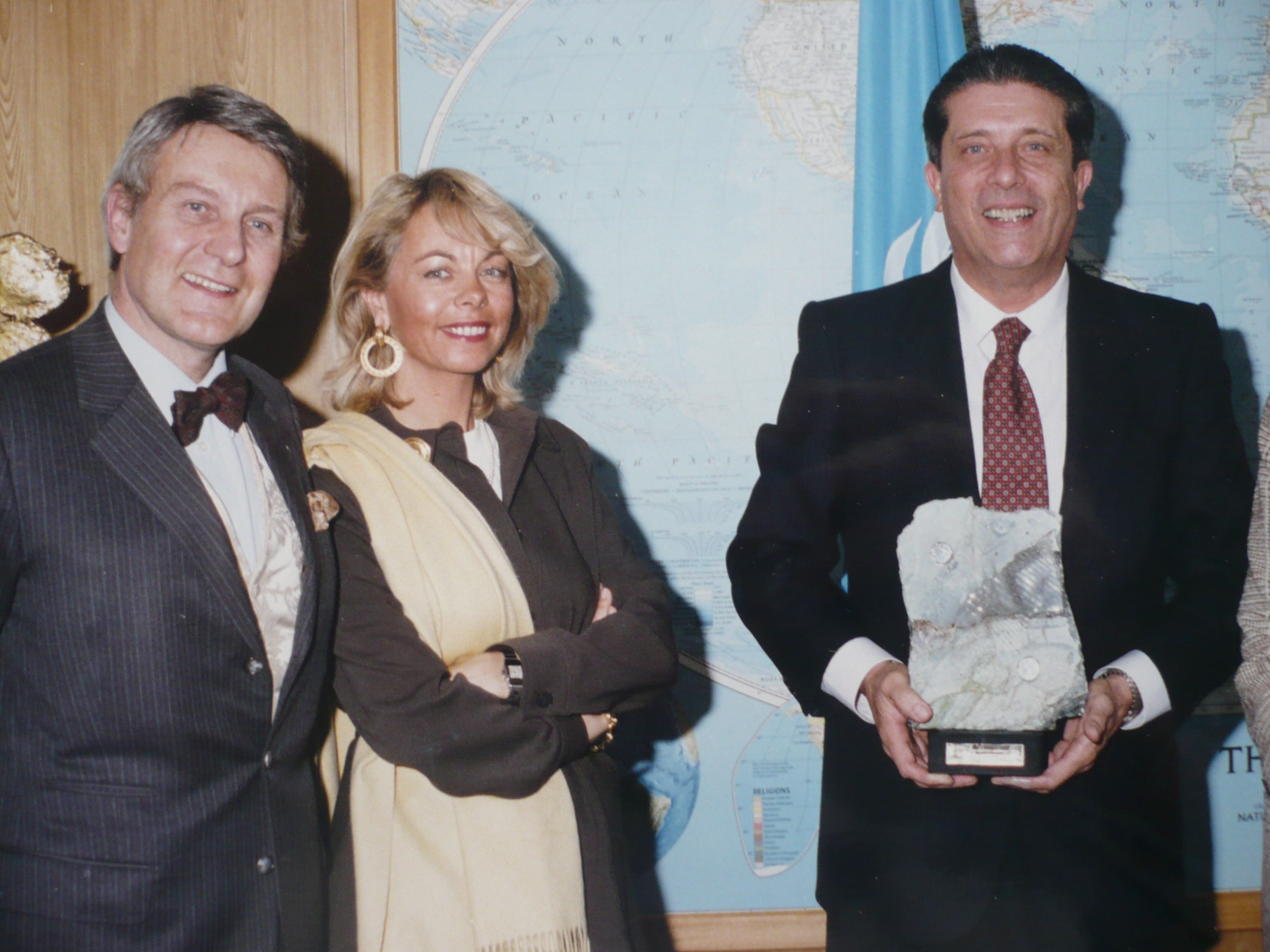 Federico Mayor Zaragoza (Directeur Général de l'UNESCO 1987-1999) au siège de l'UNESCO à Paris en présence d'Alain Husson-Dumoutier, Artiste de l'UNESCO pour la Paix et de sa compagne, Sophie Husson-Dumoutier. Evènement lors de la remise d'un prix.